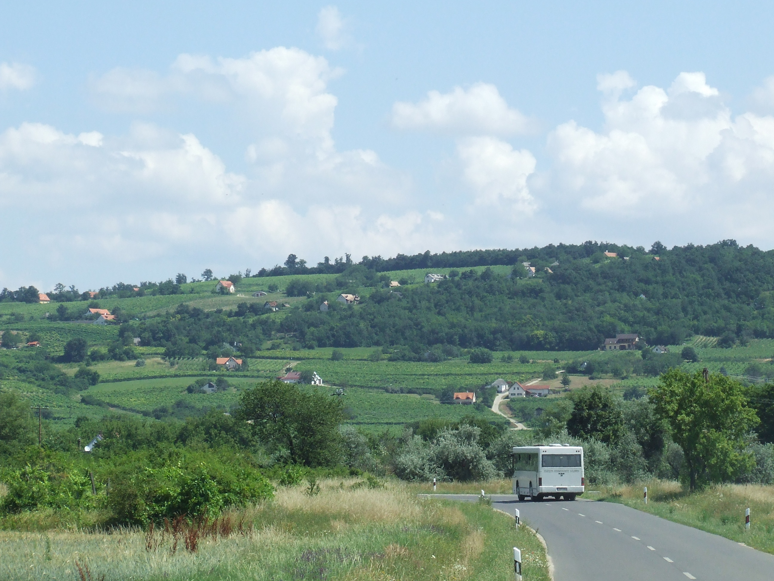 Tagyon